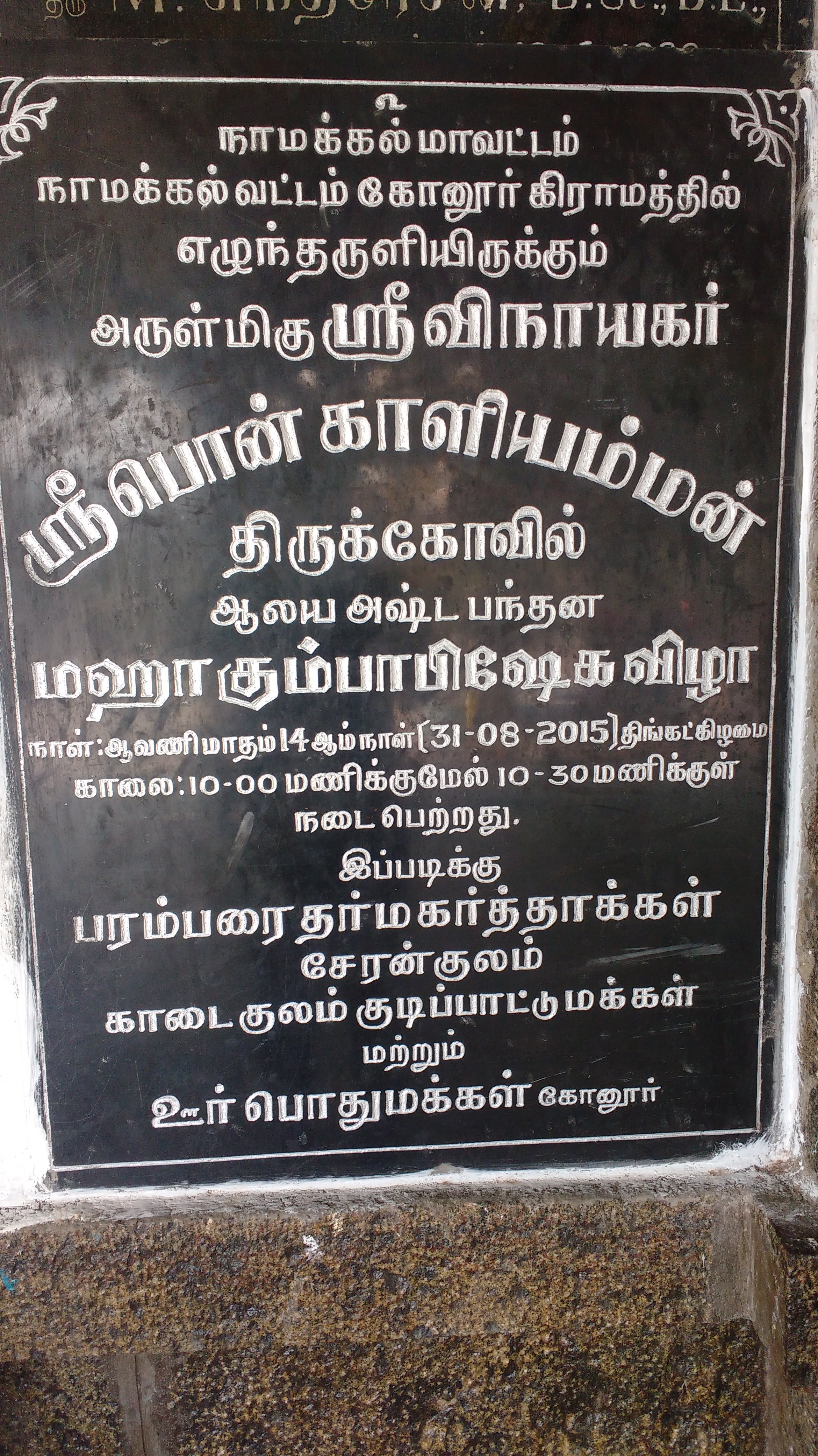 31.08.2015 கும்பாபிஷேக விழா